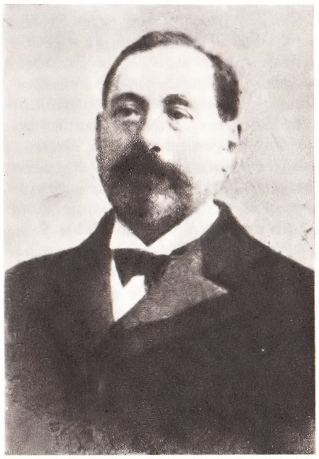 Jan Taubenhaus, Jean Taubenhaus (ur. 14 grudnia 1850 w Warszawie, zm. 14 września 1919 w Paryżu), szachista polski, działający głównie we Francji. Był jednym z prekursorów gry symultanicznej na ziemiach polskich.